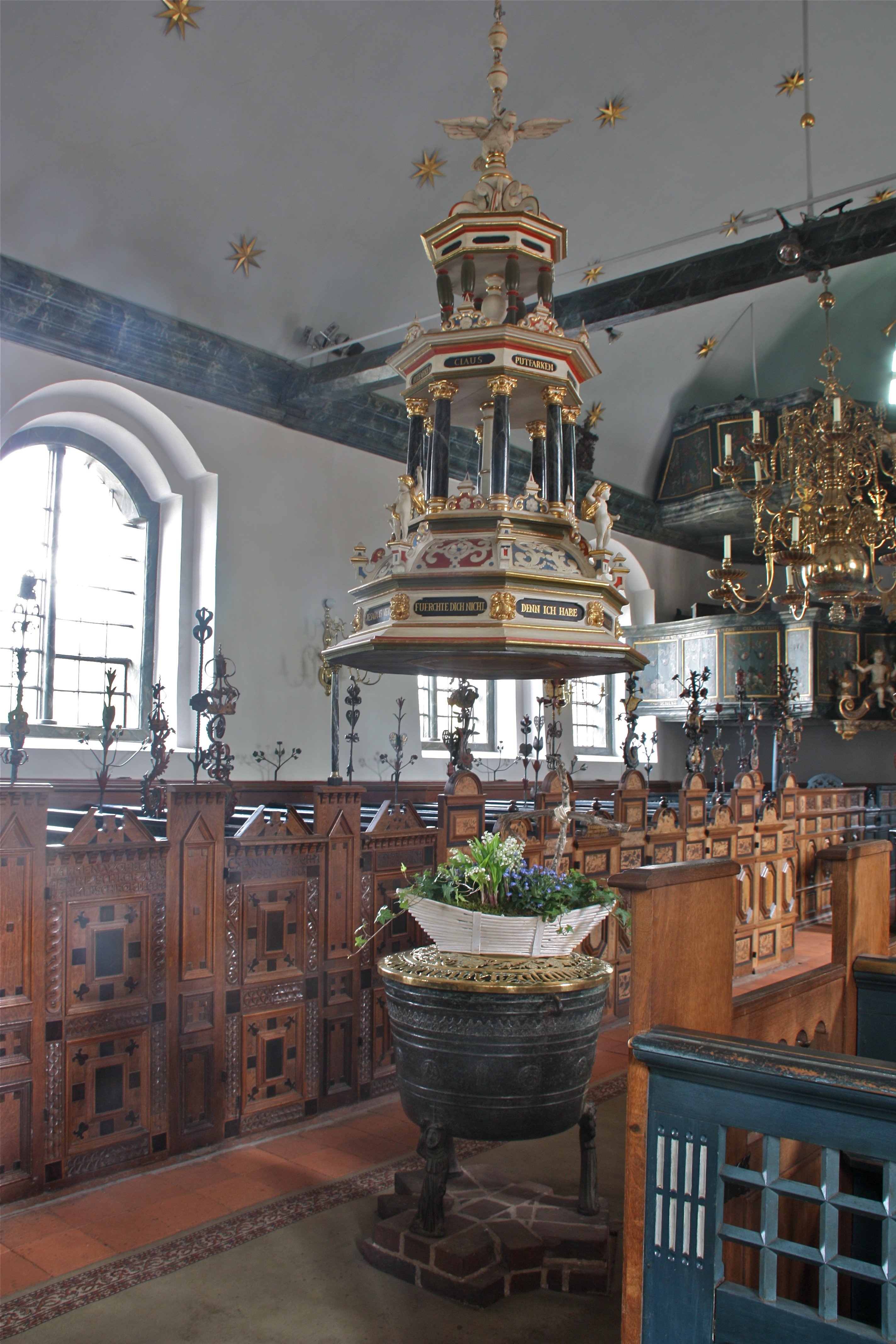 Hamburg, Altengamme, Kirche St. Nicolai, Taufe mit Deckel This is a photograph of an architectural monument.